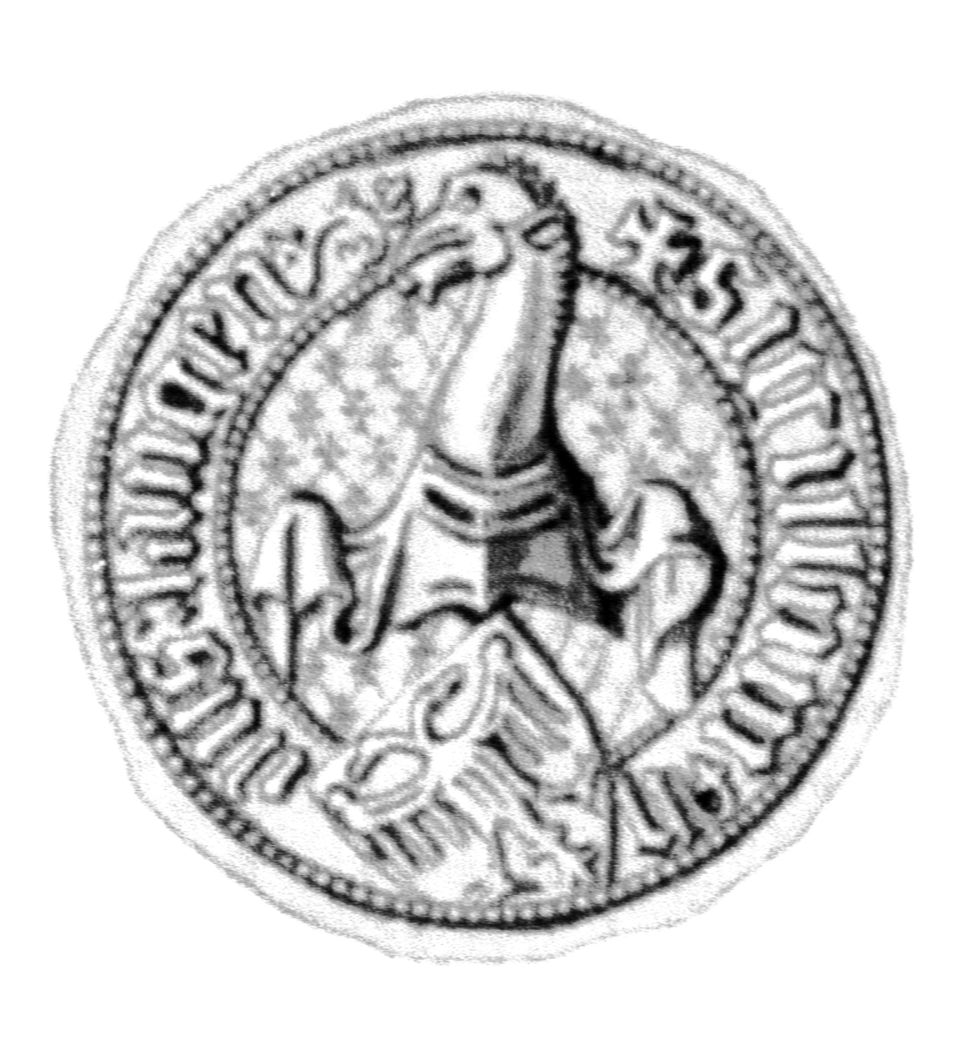 Siegel des Ratsmannes Hans Lange. Das Siegel stammt aus der Zeit um 1415. Siehe Emil Ferdinand Fehling: Lübeckische Ratslinie, Nr. 447 (Johann Lange).